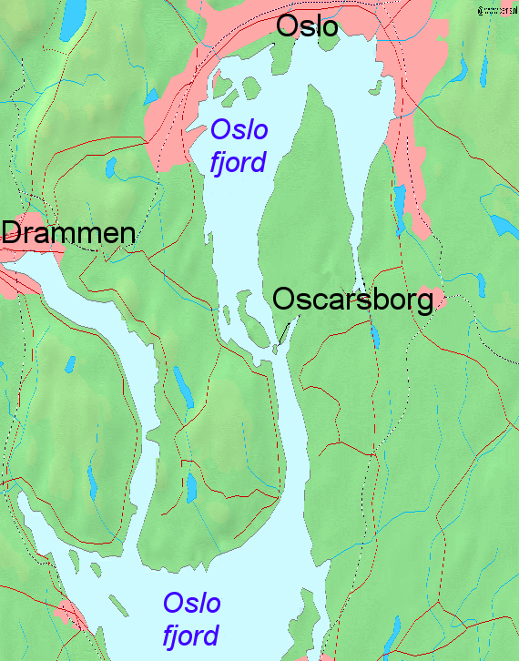 Oscarsborgi kaart